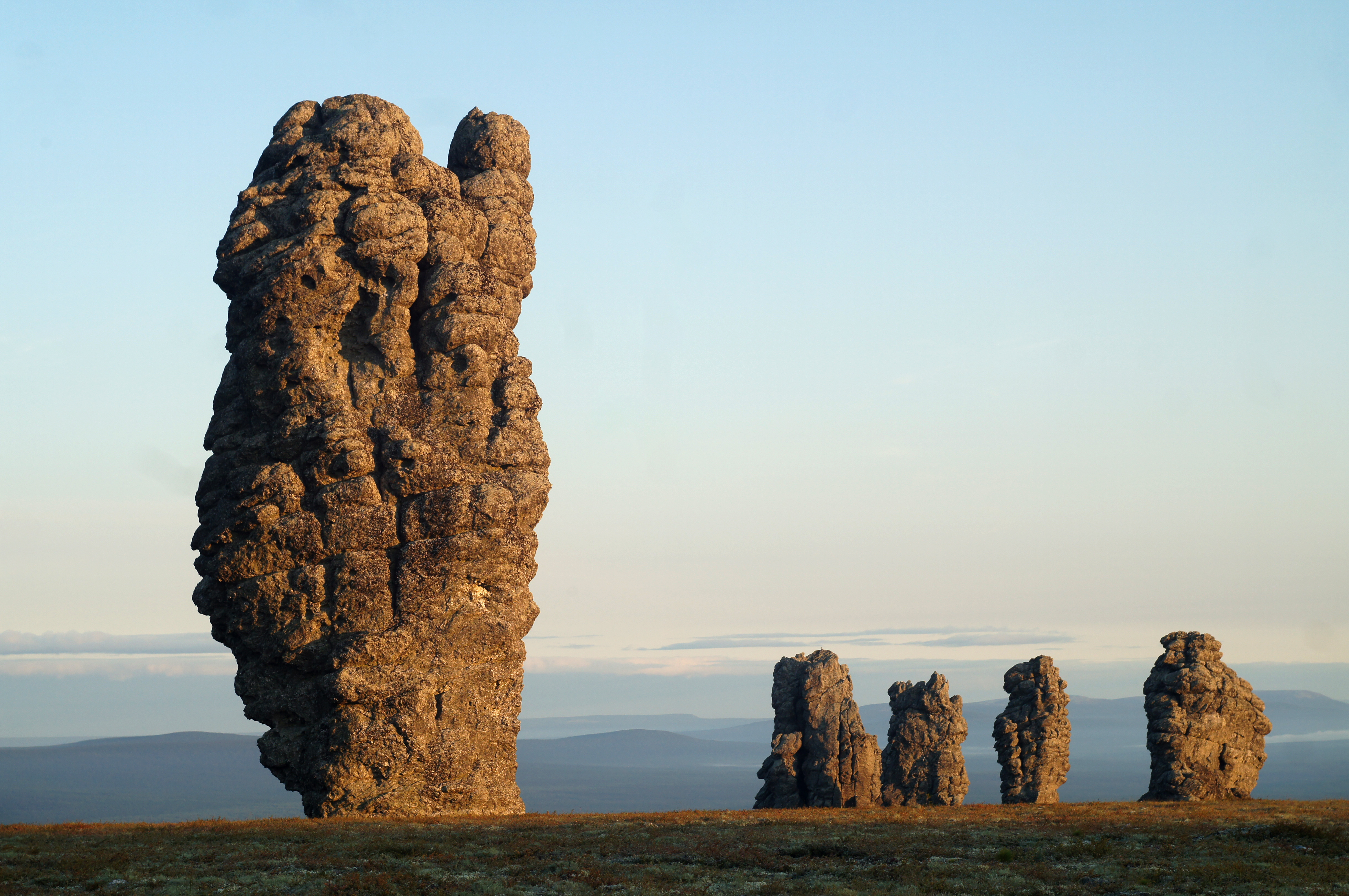 Столбы выветривания (Большие манзские болваны), Троицко-Печорский район This image is related to the protected area of Russia number 1110342